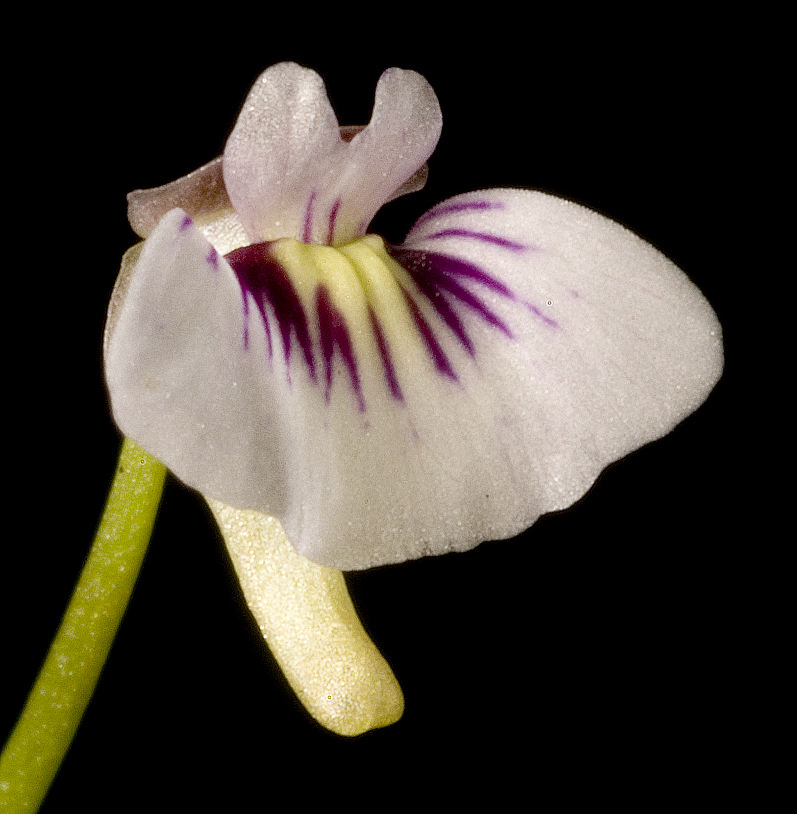 KRT3899